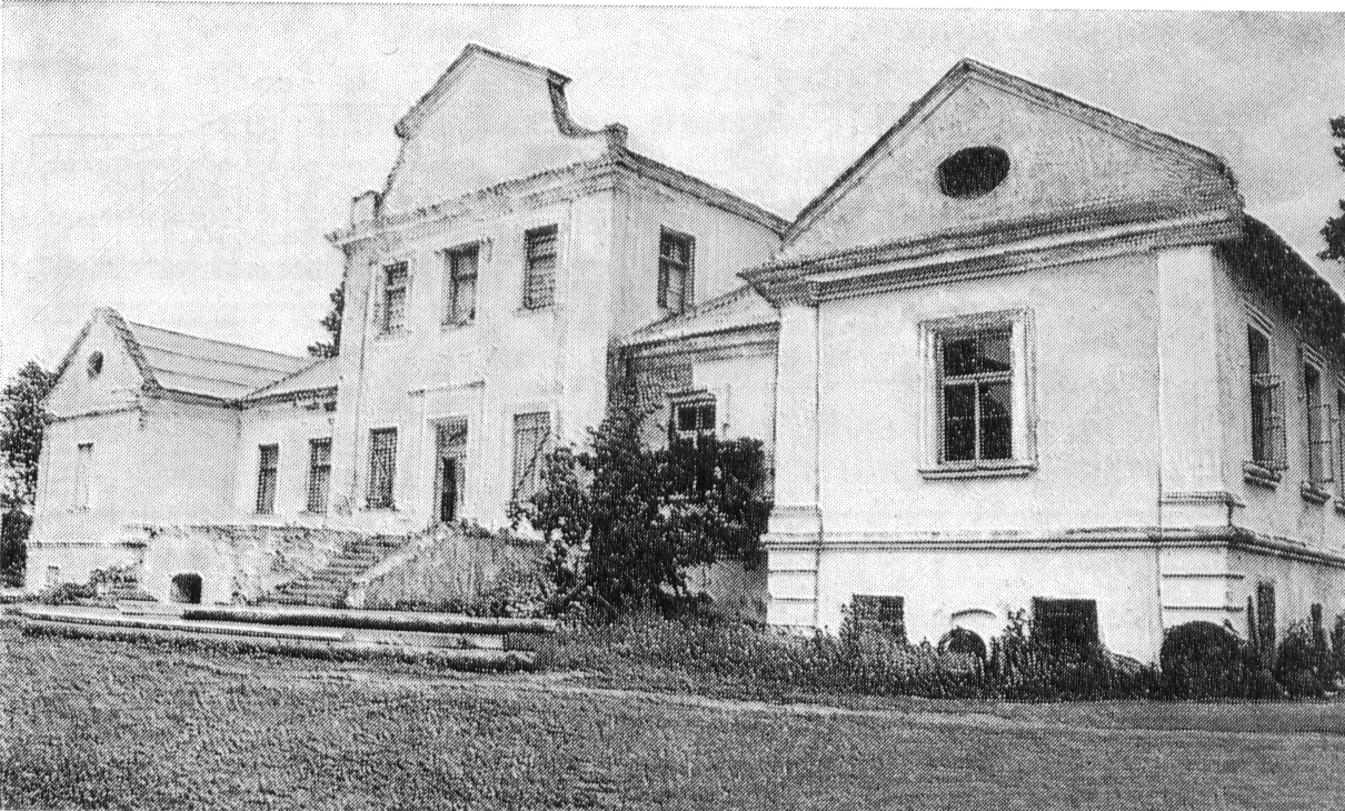 Усадьба Леонполь